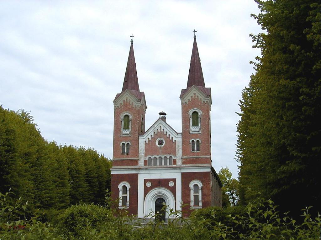 Rīga, Mārtiņa luterāņu baznīca 2001-05-13